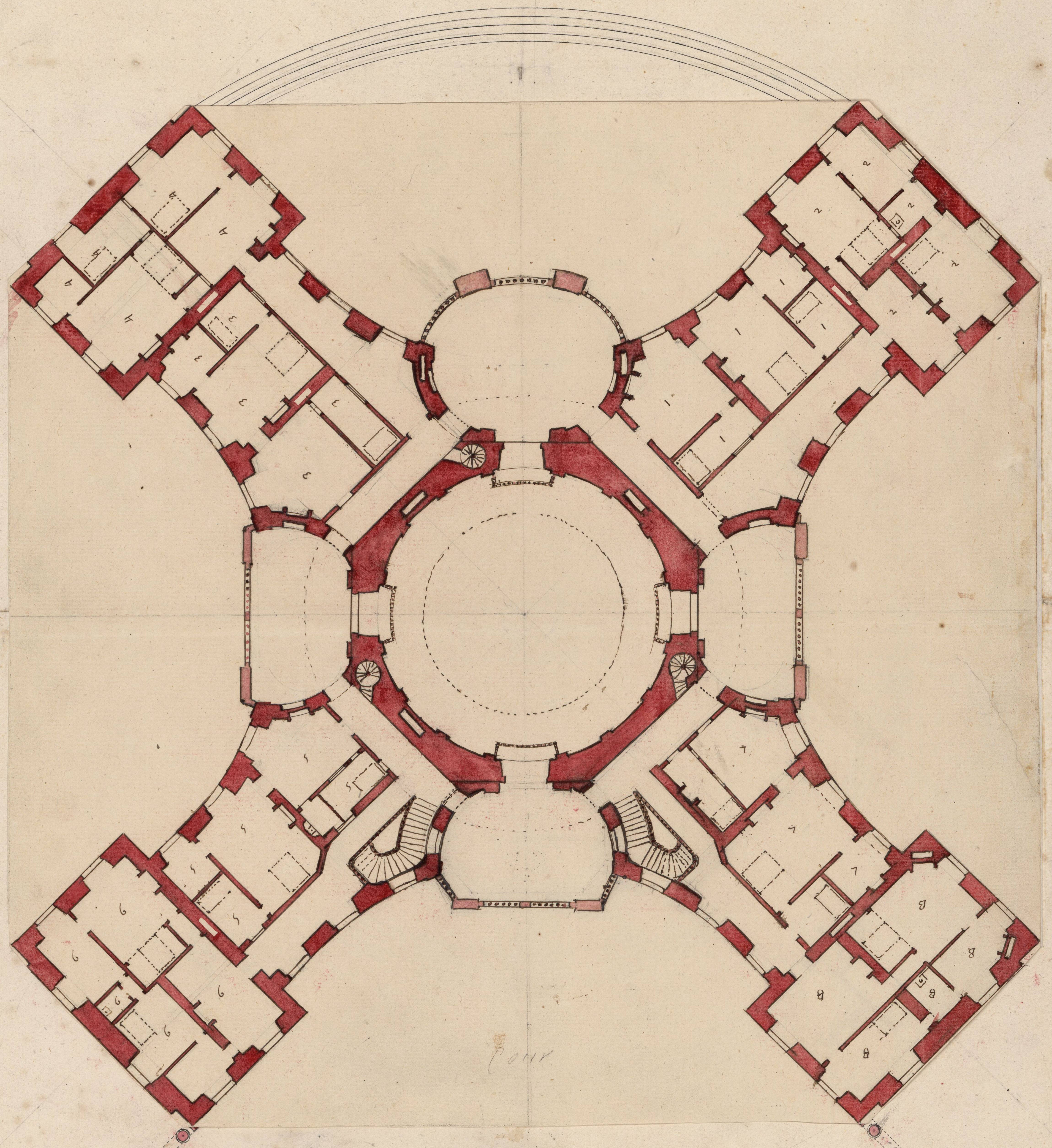 Plan für den Neubau eines Schlosses in Compiègne